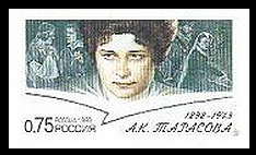 Почтовая (оригинальная) марка с почтовой карточки, посвящённая 100-летию со дня рождения А. К. Тарасововй